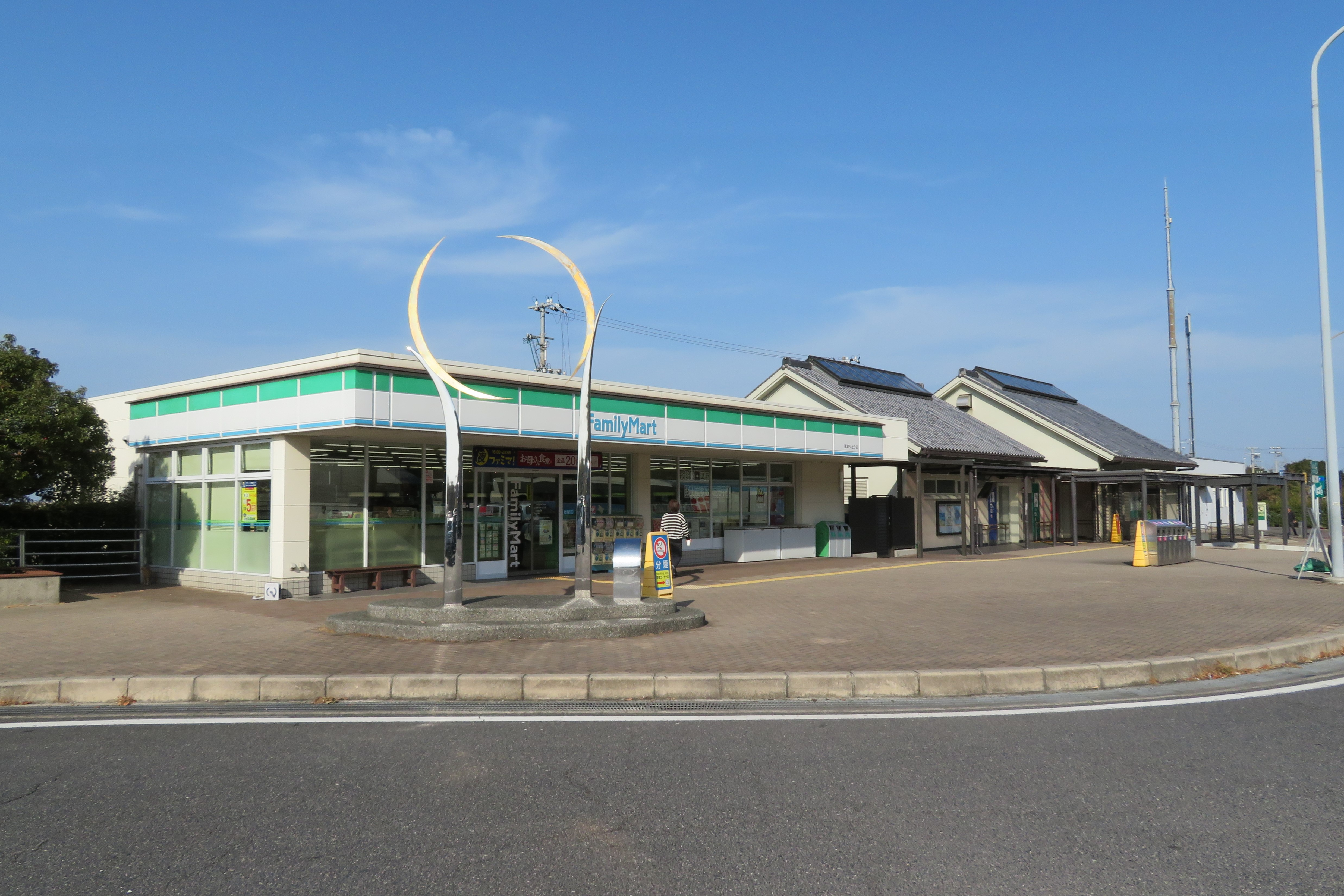 室津パーキングエリア（上り線側施設） Canon PowerShot SX730 HS